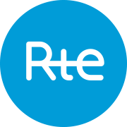 Logo de RTE (2014)